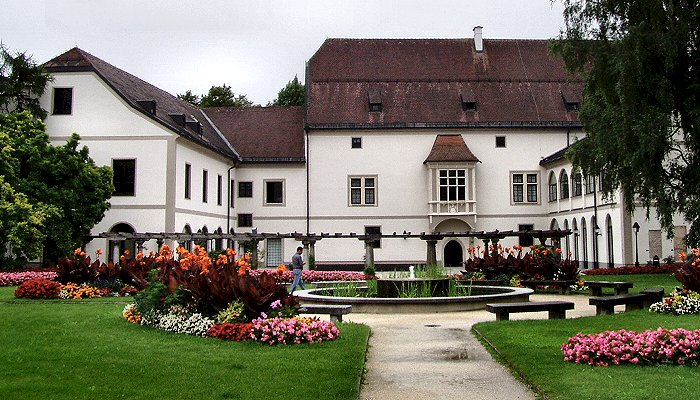 Burg Wels, Sterbeort von Kaiser Maximilian I.